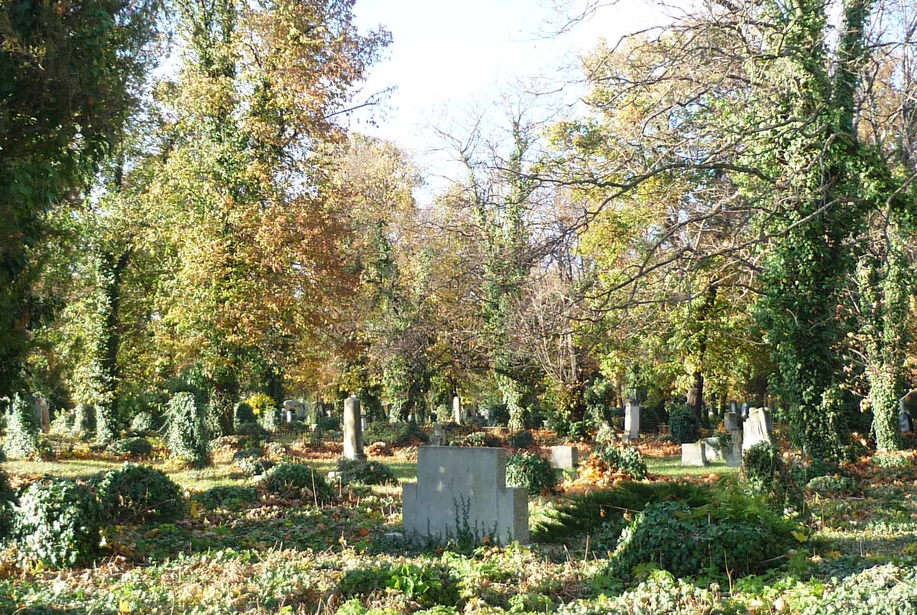 Alter Antoniusfriedhof in Saaz (Žatec)